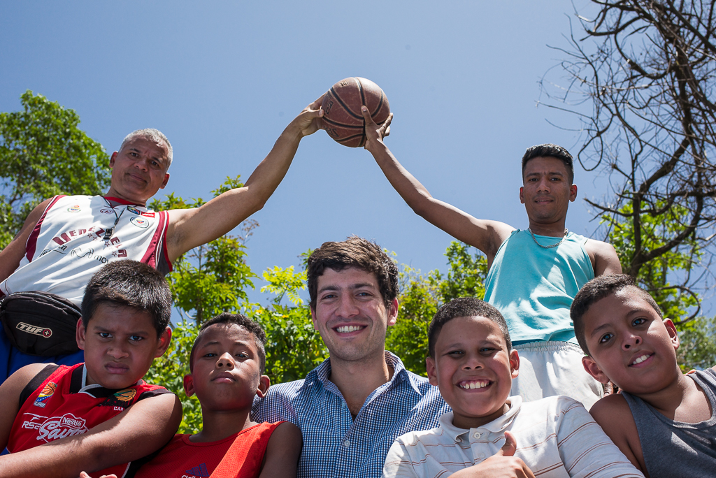 Roberto Patiño en la ocmunidad del 23 de Enero.